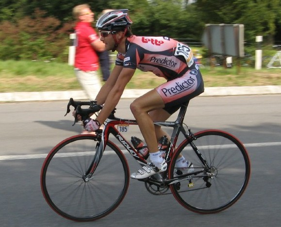 Pieter Mertens beim Radrennen Vattenfall Cyclassics 2007 bei Kilometer 109, Abzweigung Pinneberg-Süd (Waldenau)